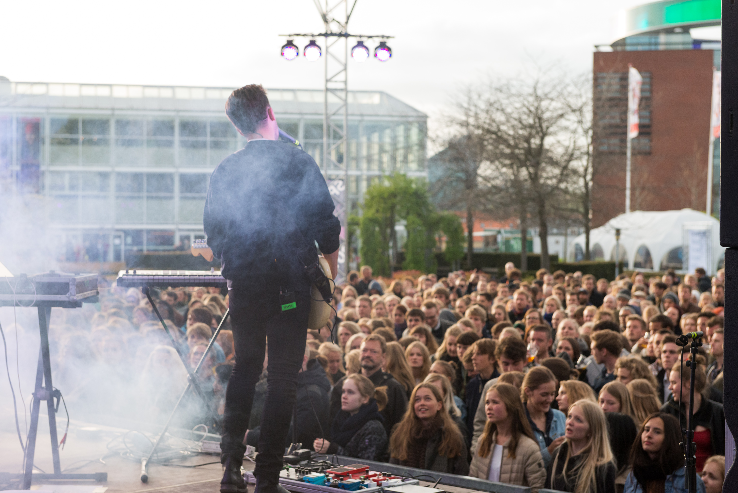 Ginger Ninja på Spot Festival 2014